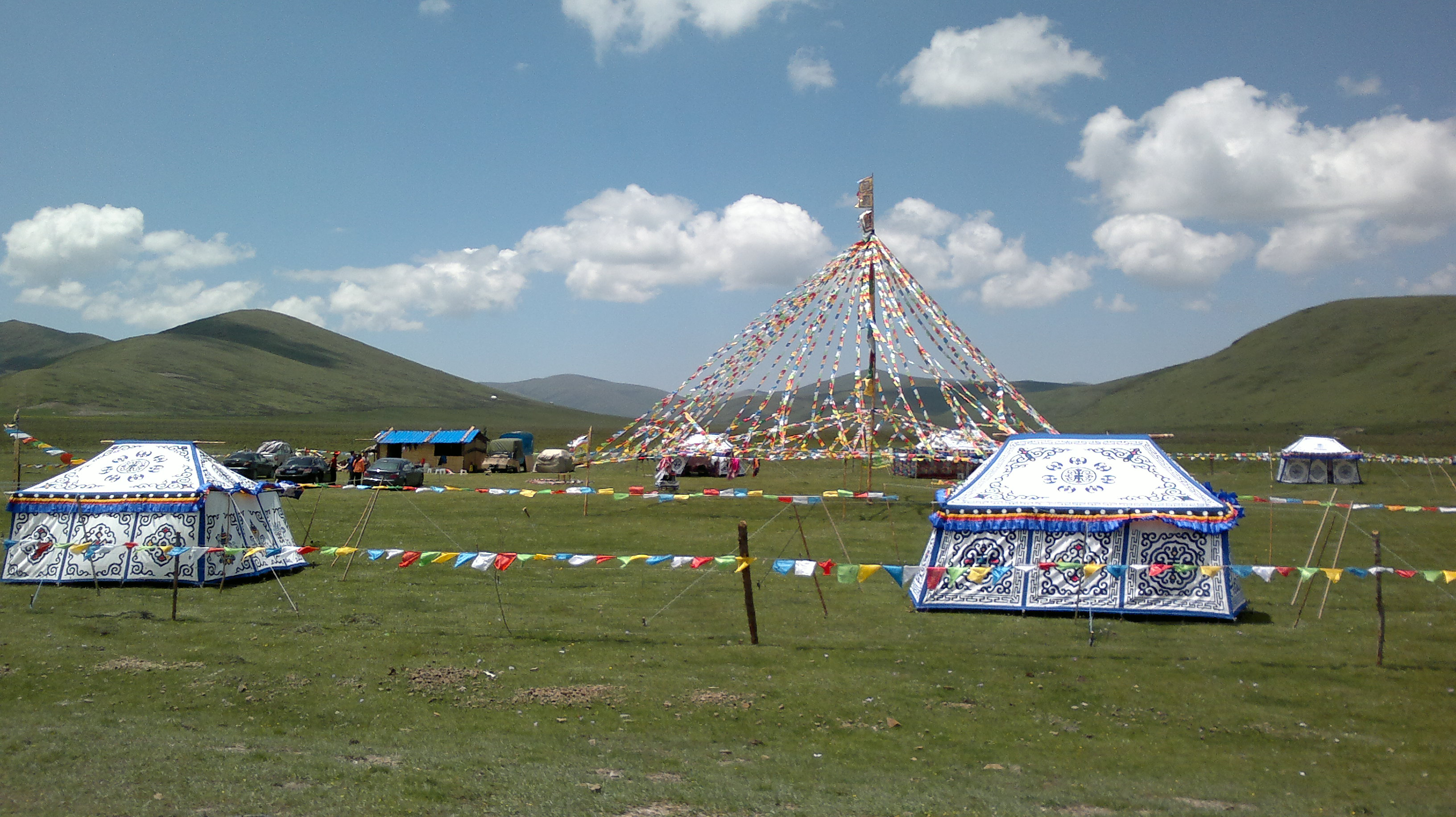 若尔盖